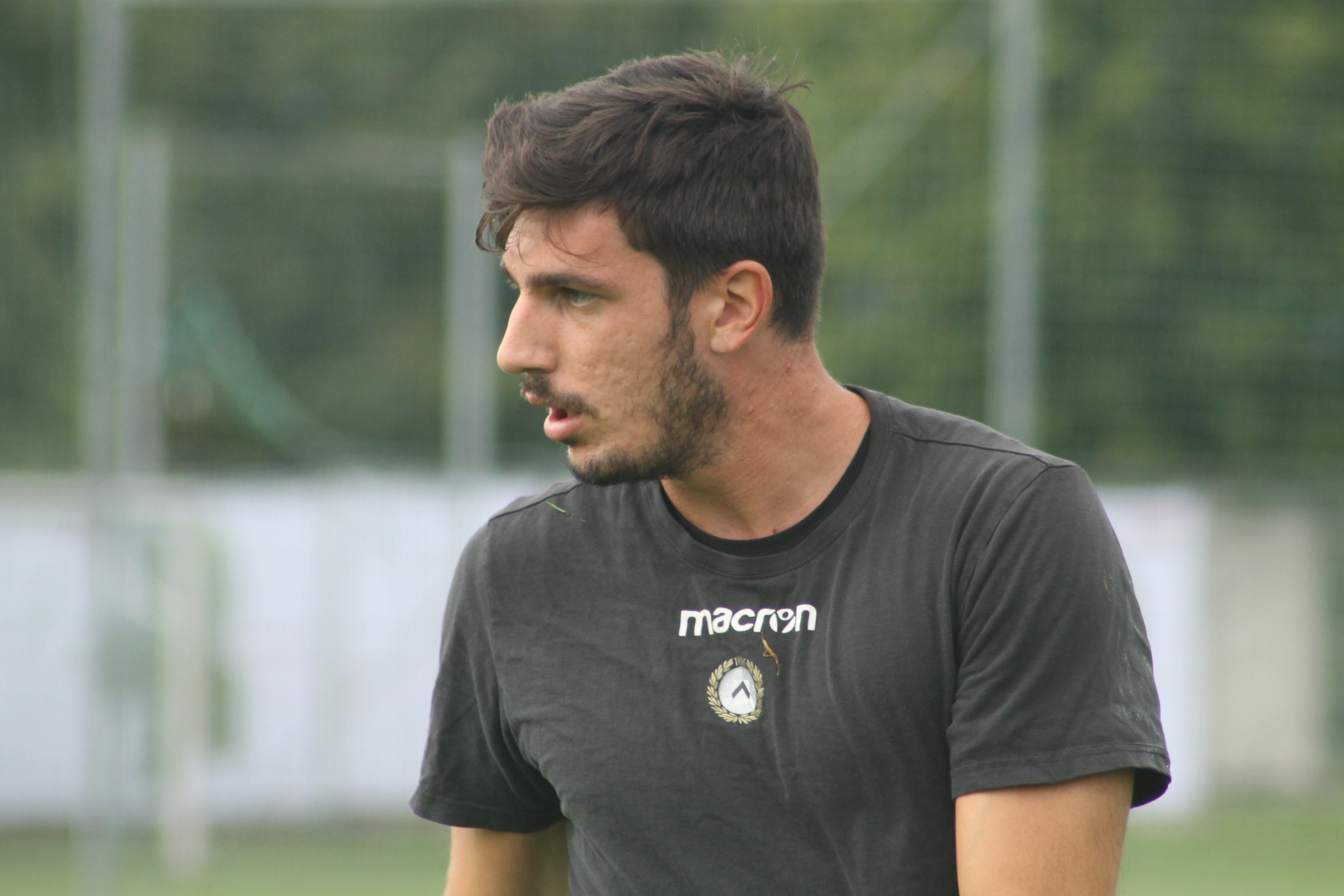 Simone Scuffet durante una seduta d'allenamento nel ritiro di St. Veit dell'Udinese.